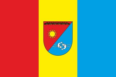 Прапор села Оксамитне (Болградський район)